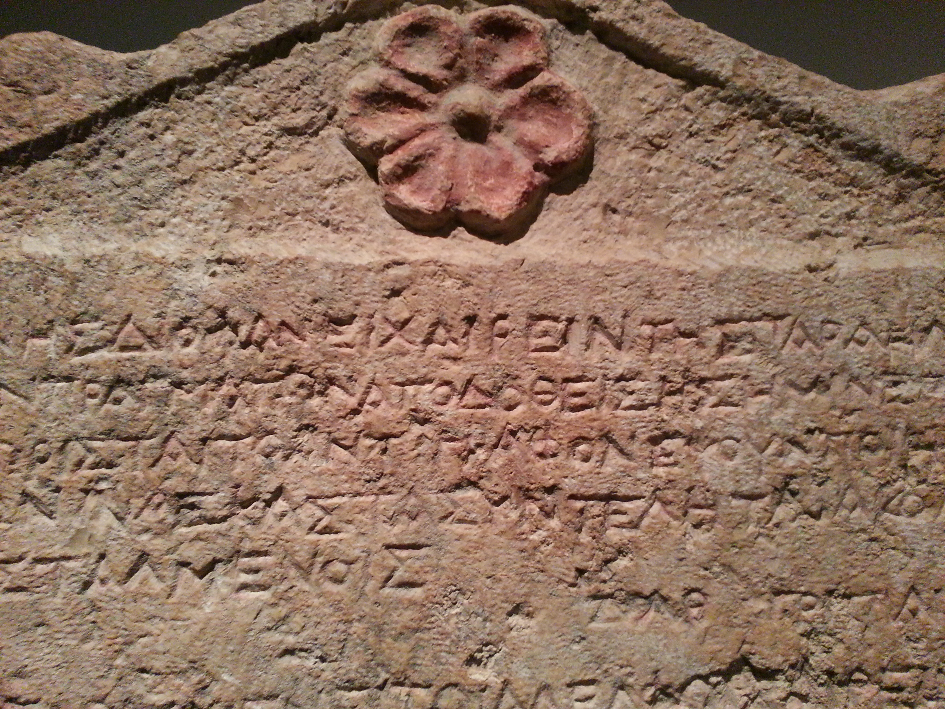 כתובת הליודורוס במוזיאון ישראל בירושלים